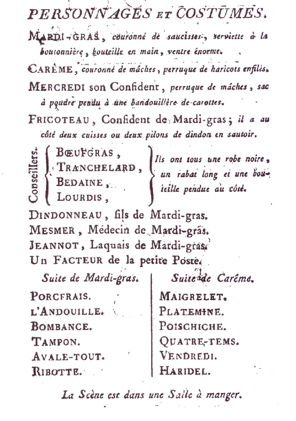 Distribution de "La mort de Mardi-Gras, tragi-comédie ou Comédie faite pour pleurer, ou tragédie pour rire . En un acte et en vers, par des membres de l'Académie de Cocagne"